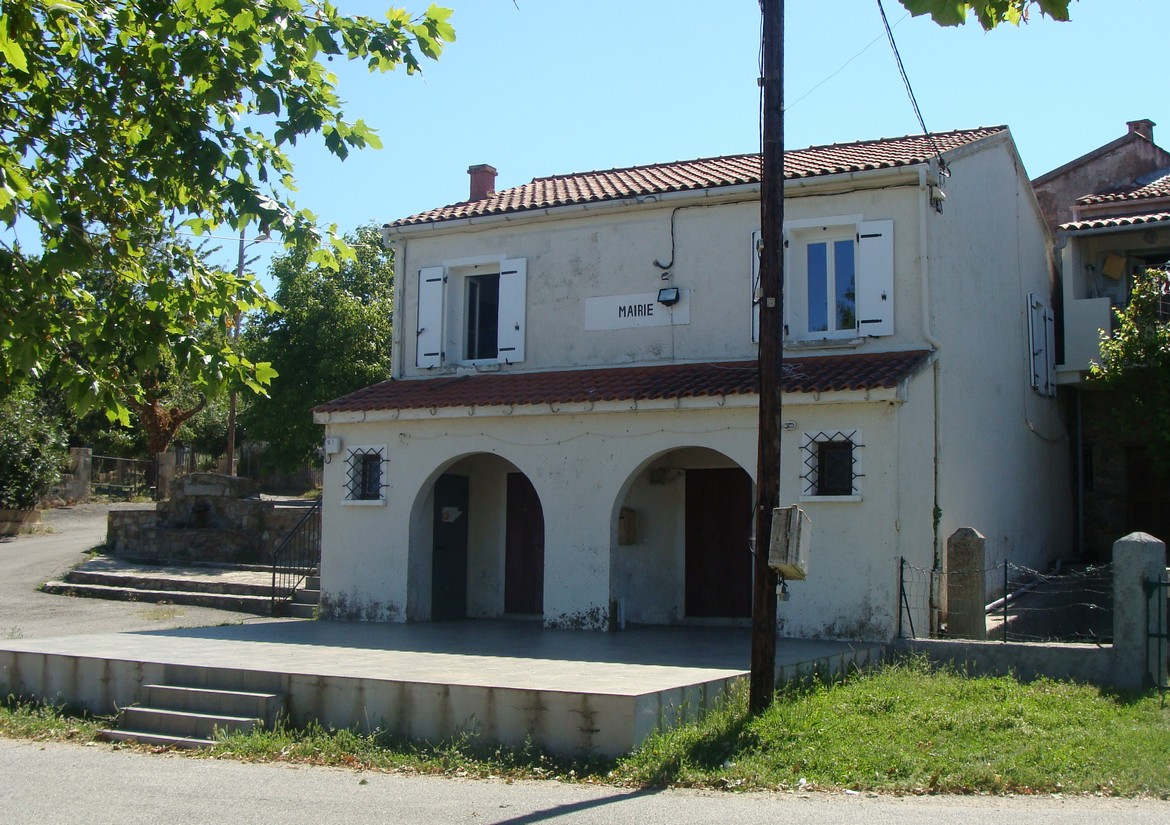 La mairie de Serra-di-Fiumorbo (Haute-Corse)